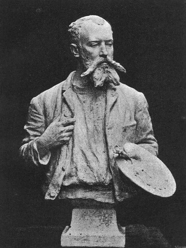 Büste des Malers Courtois. Gipsbüste